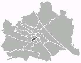 Positionskarte des 6. Wiener Gemeindebezirks Unter Verwendung einer Vorlage von Extrawurst. Public Domain.